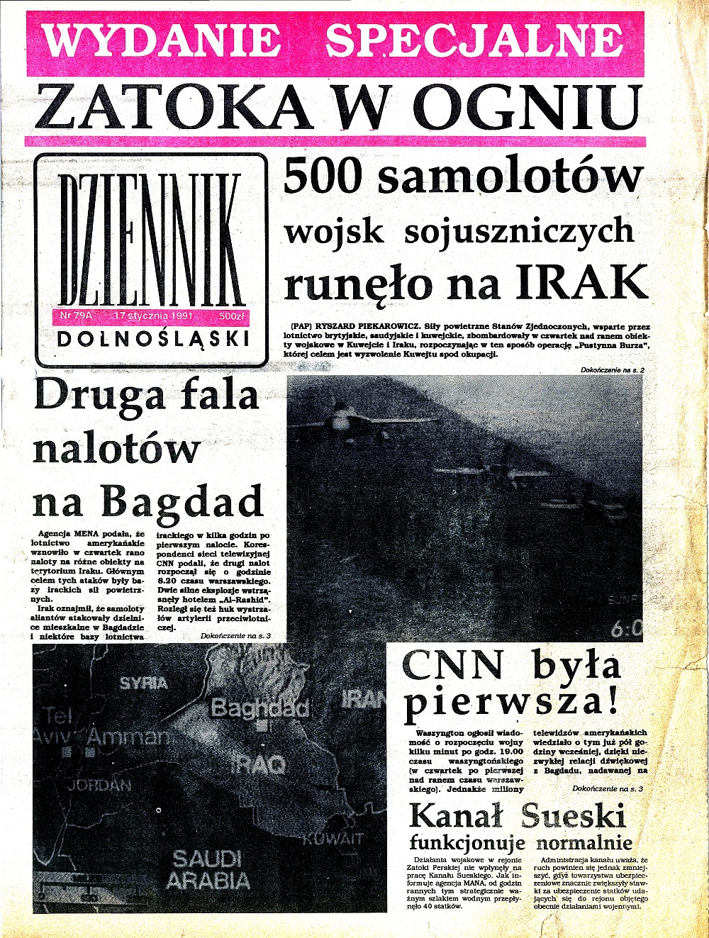 Dziennik Dolnośląski wydanie specjalne z 17.1.1991 (początek "Pustynnej Burzy")